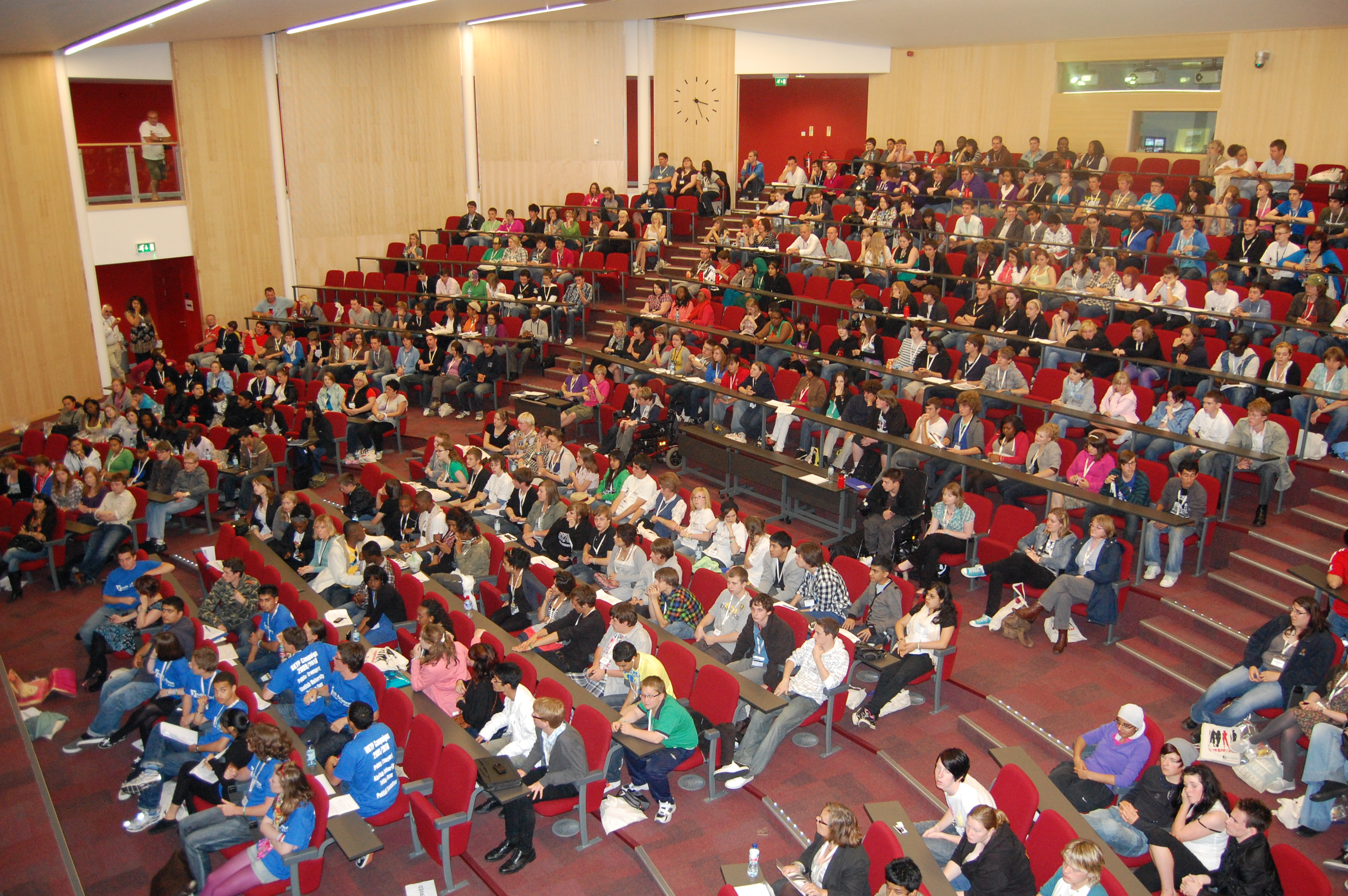 Annual Sitting 2009